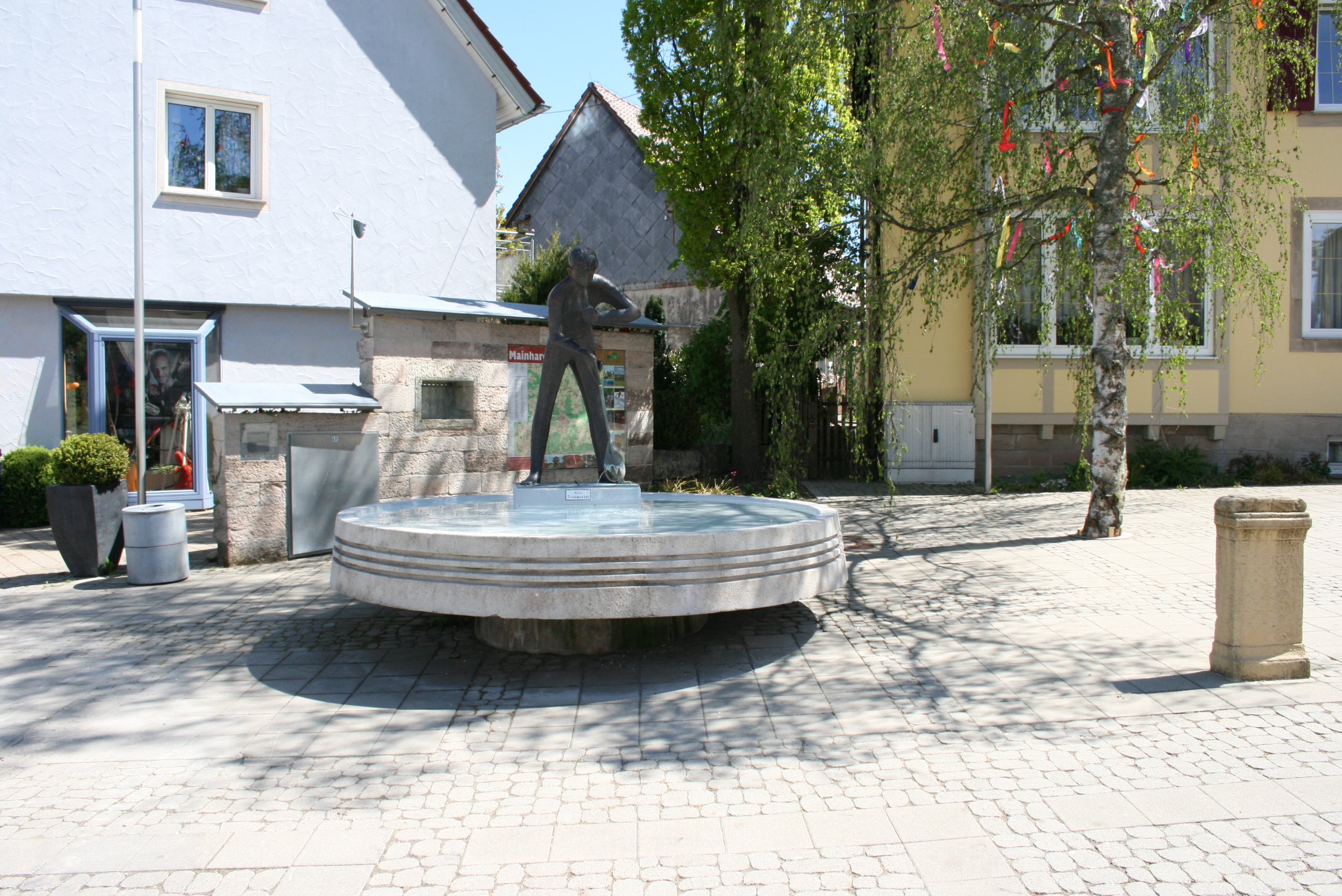 Der Brunnen vor dem rathaus in Mainhardt